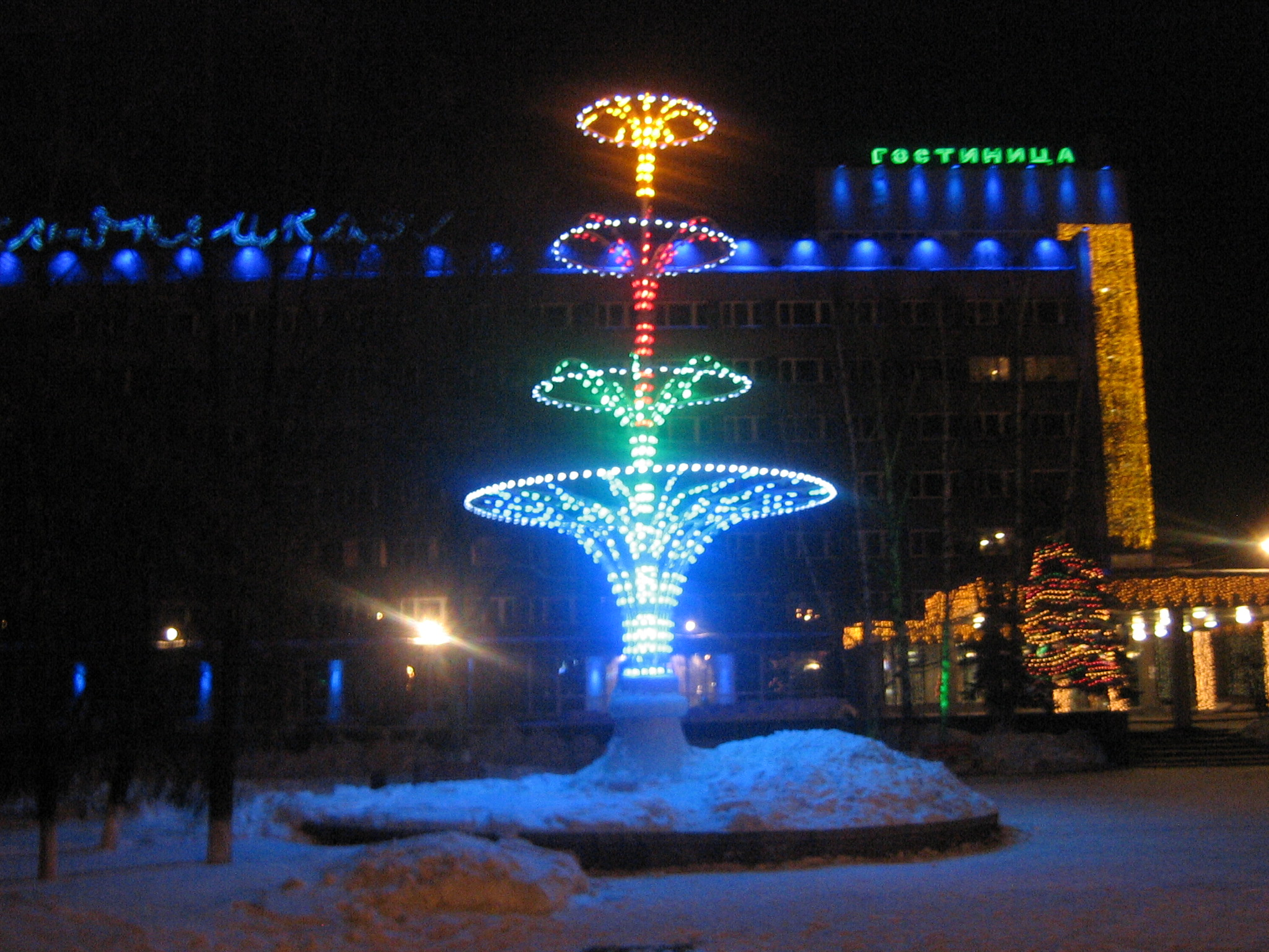 La Fontana illuminata davanti all'Hotel "Novokuzneckaja", Utlitsa Kirova, Novokuzneck(Russia).